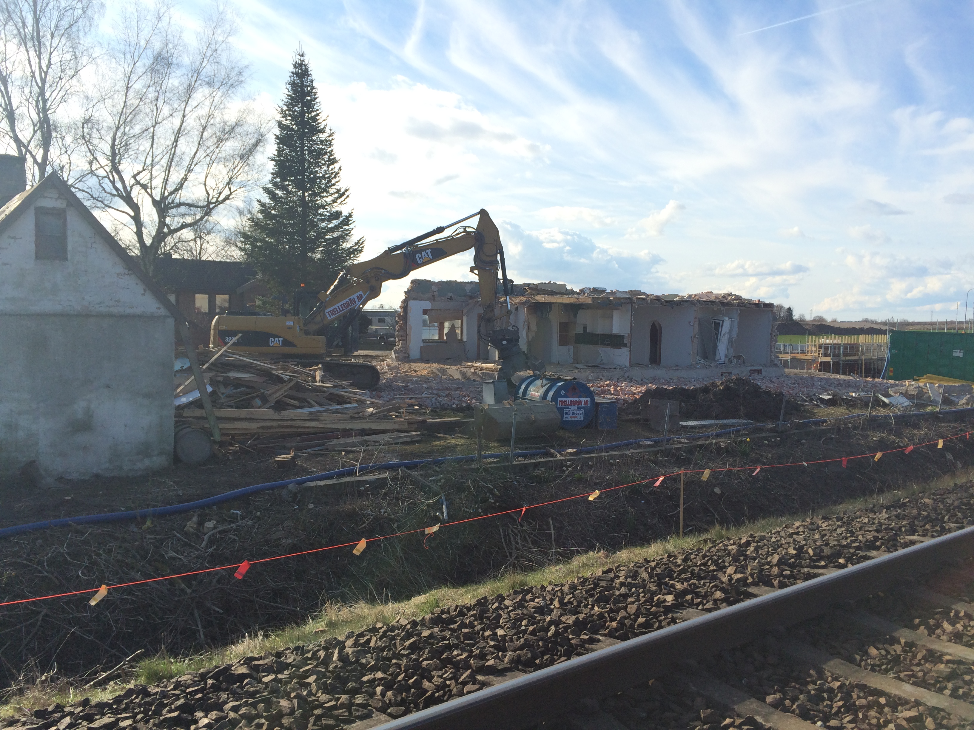 Rivning av hus vid Pågatågsstationen, Östra Grevie